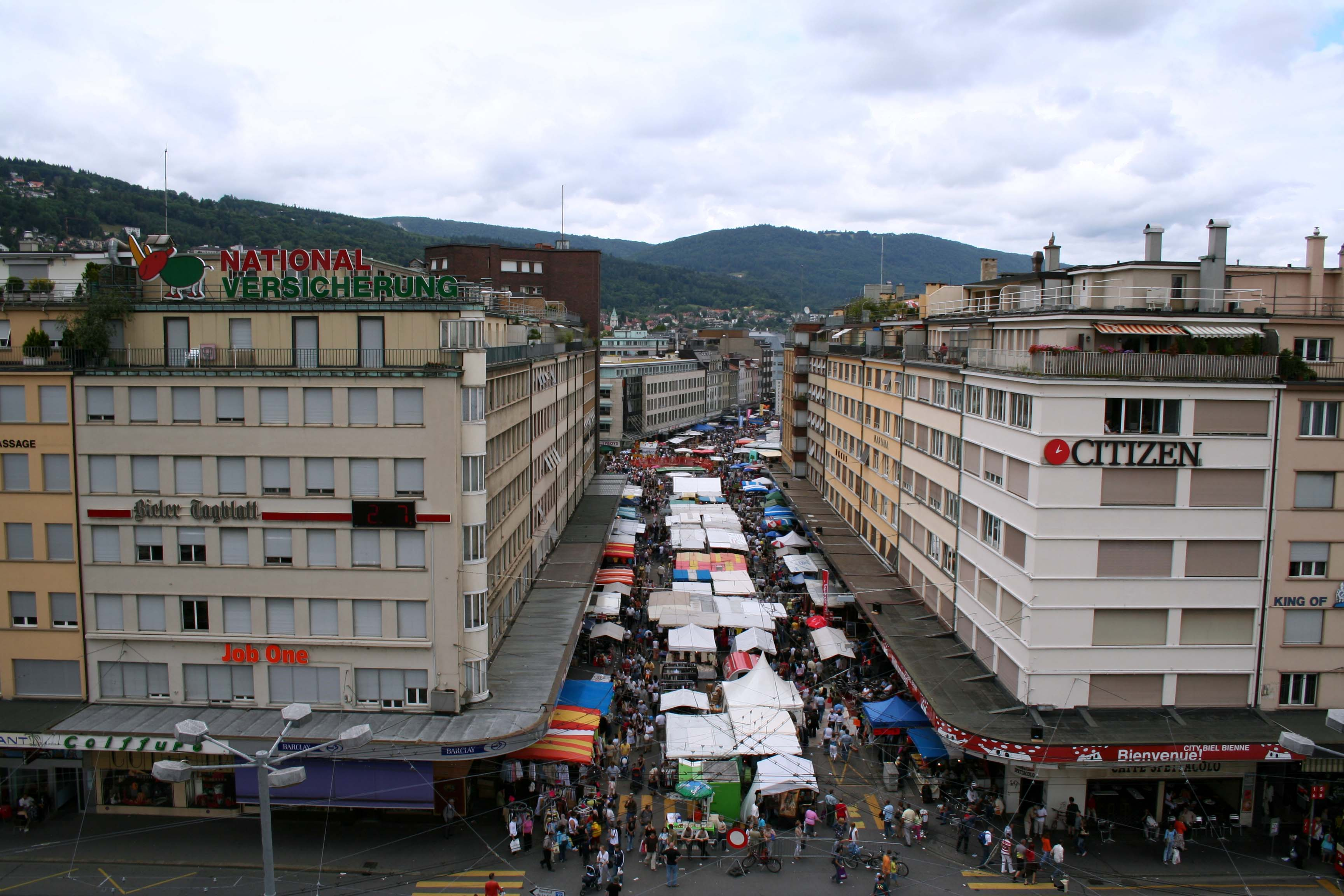 Bahnhofquartier